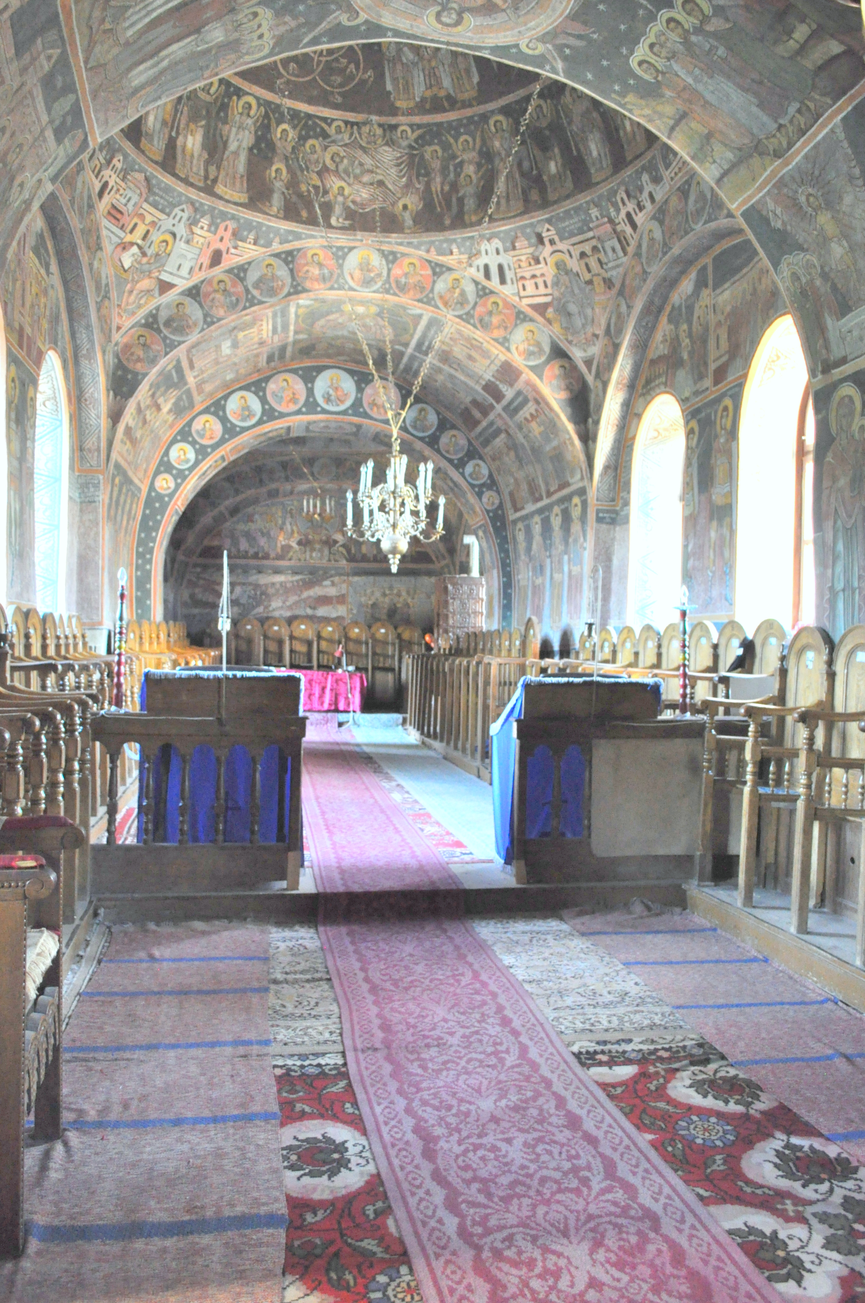 Biserica ortodoxă „Sfânta Treime”